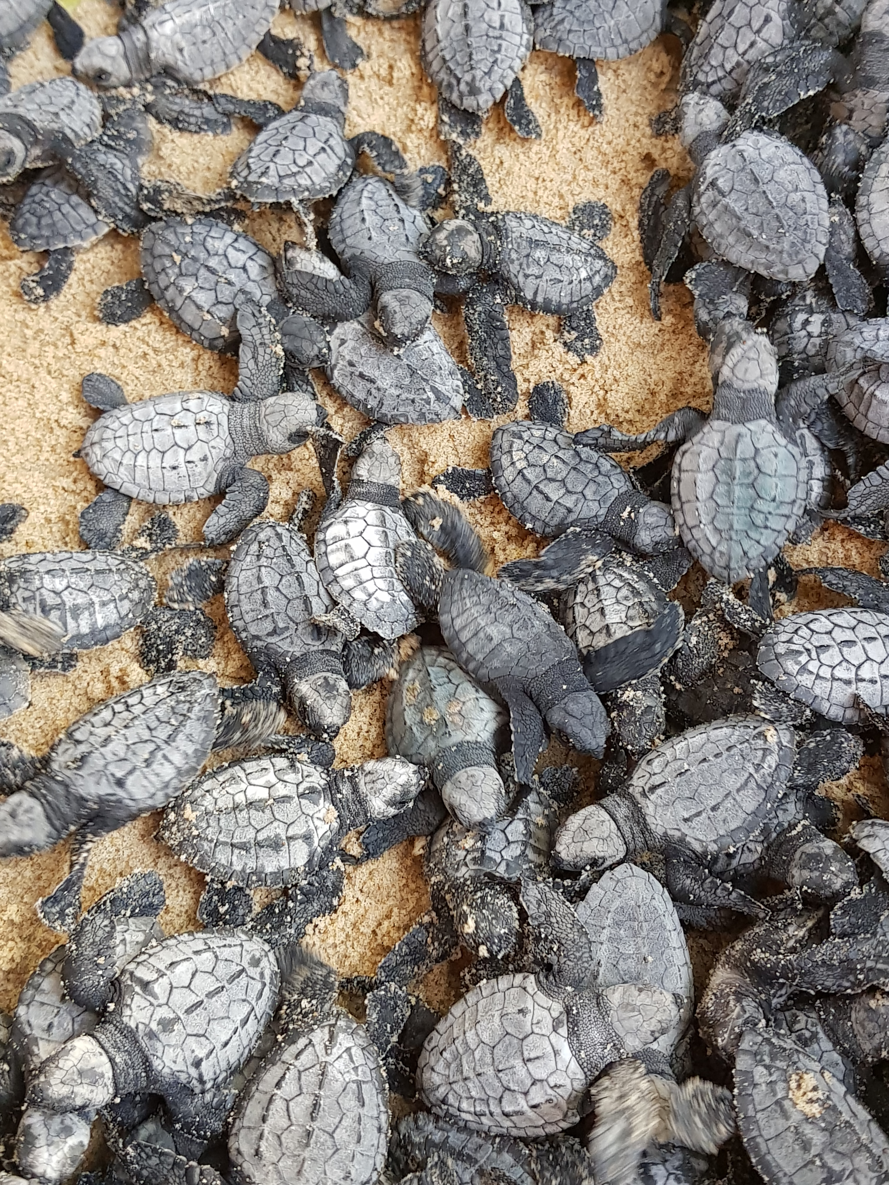 Tortues